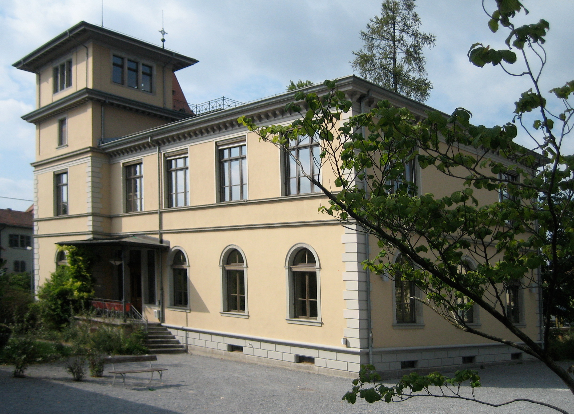 Die «Italienische Villa»